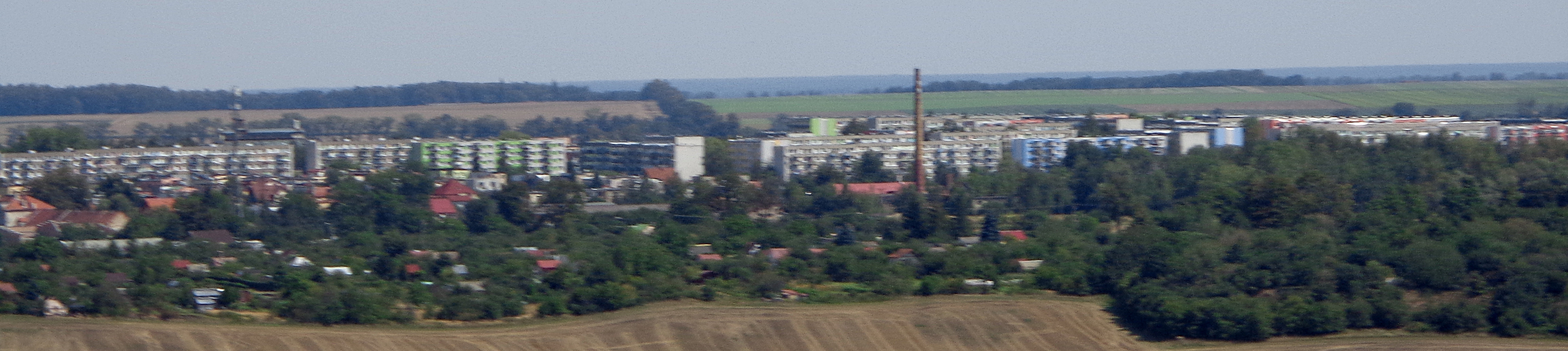 Osiedle Jesionowe Wzgórze (Sójcze Wzgórze) – widok na Prudnik z wieży widokowej na Koziej Górze.